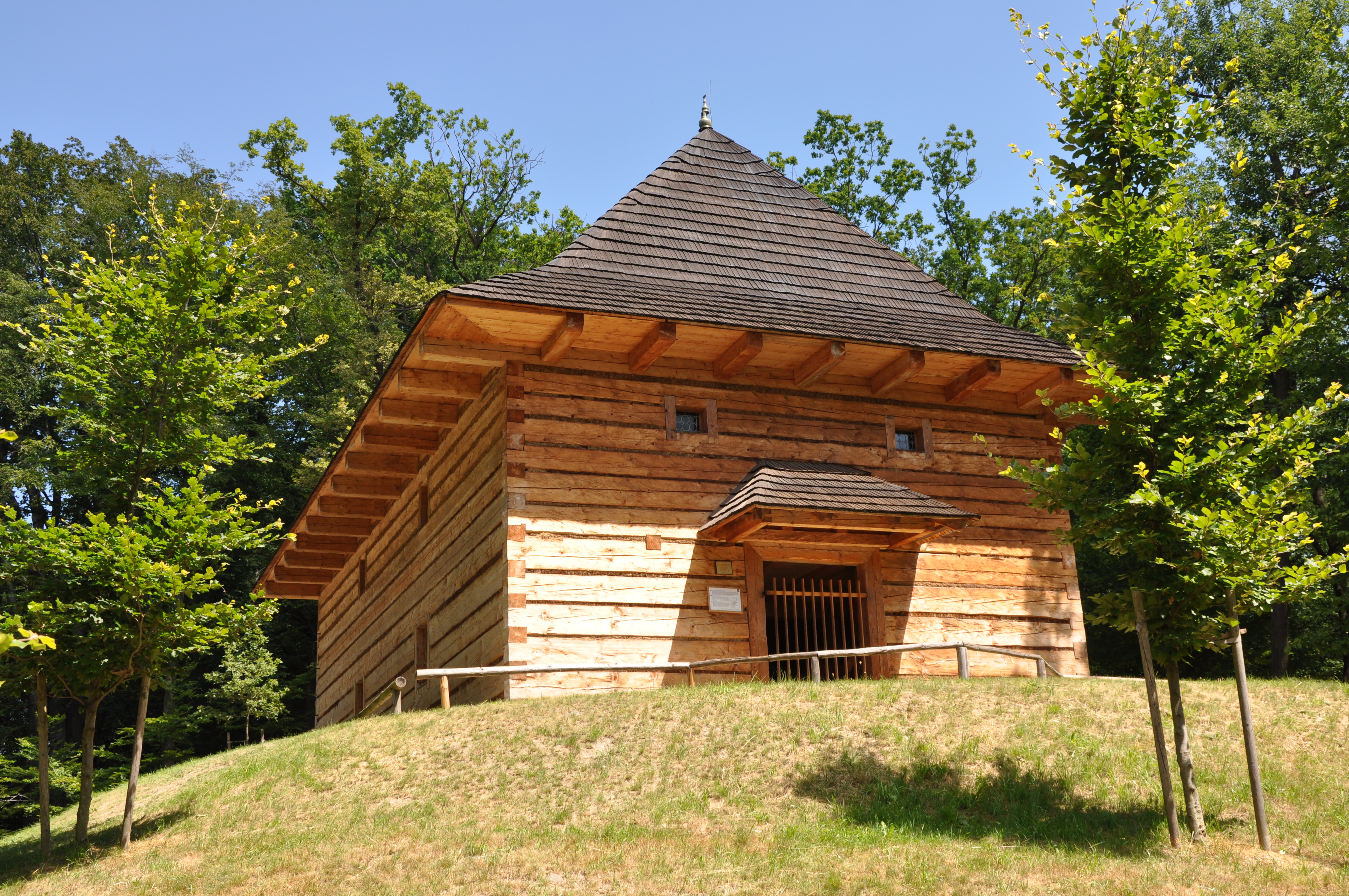 Rekonstruiertes ehem. Toleranzbethaus in Rožnov pod Radhoštěm (Rosenau unter dem Radhoscht), errichtet im Walachischen Freilichtmuseum